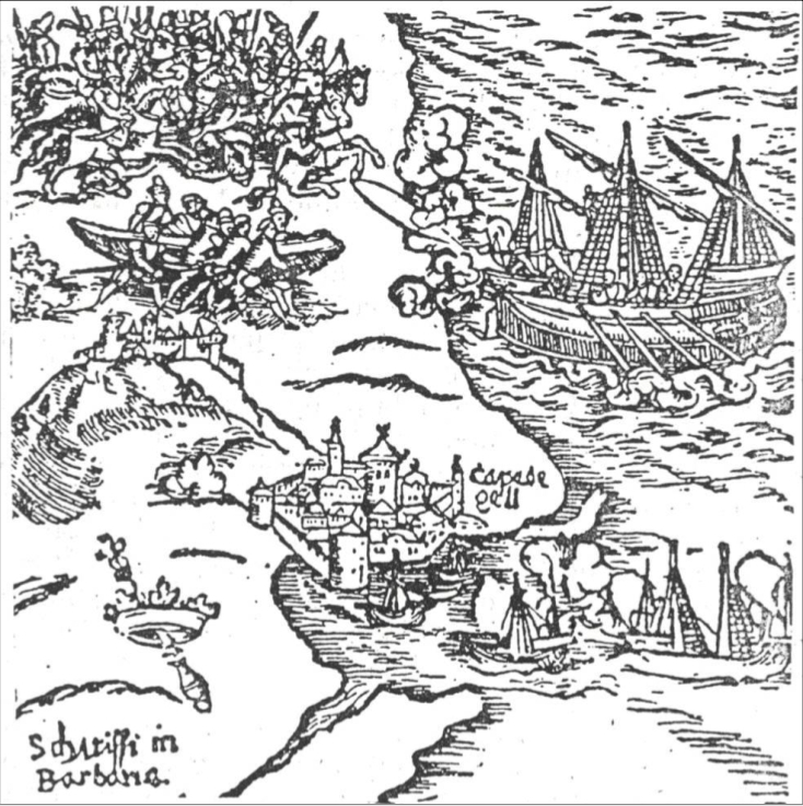 Vue de Santa Cruz du Cap de Gué (Agadir), au XVIème siècle